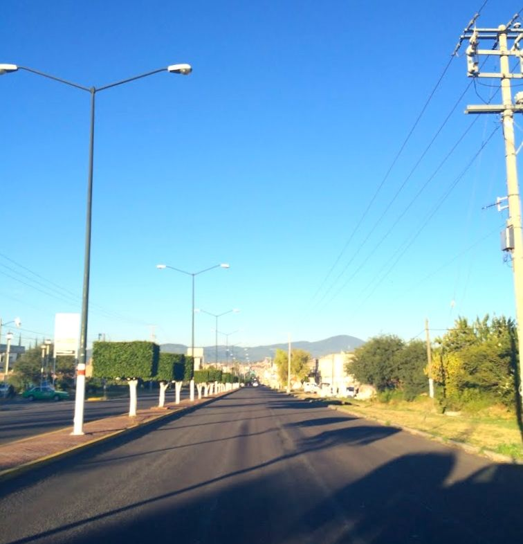 Acceso a Uriangato por el Bulevar Leovino Zavala